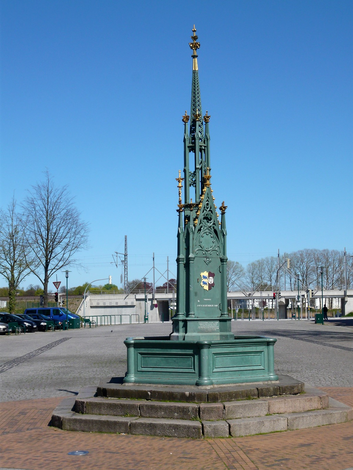 Brunnen auf dem Schloßplatz in Rendsburg. Errichtet am 6. Dezember 1881, restauriert 1984. Inschrift: "Graf Gerhard der Grosse bestätigt und erweitert der Stadt Rendsburg Gerechtsame und Gebiet am Nicolaitage 1339".